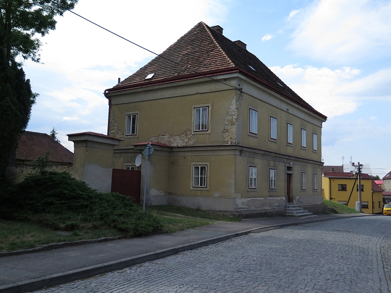 Fara, T. G. Masaryka 131, Borohrádek.